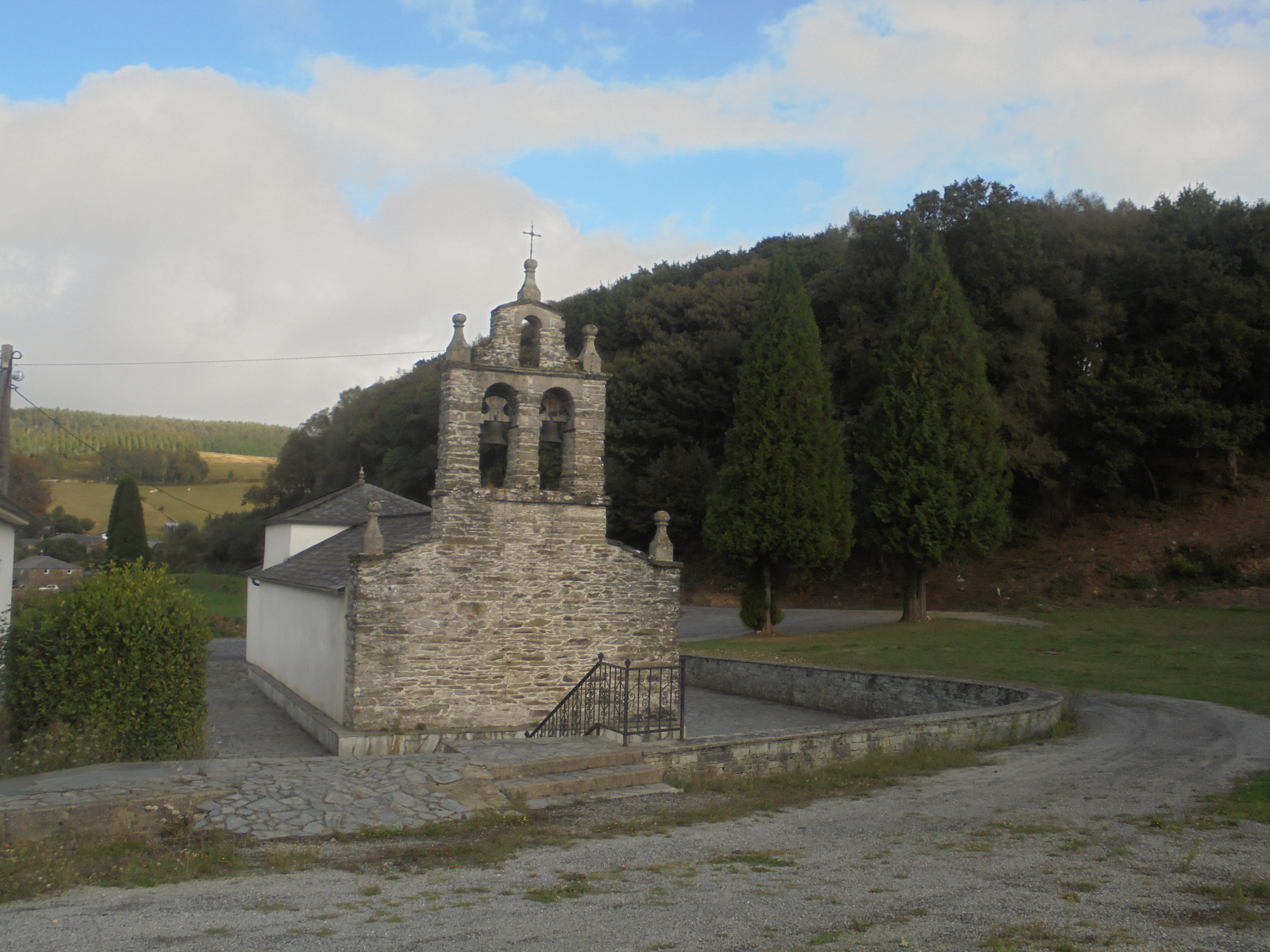 Igrexa parroquial de Sto. André de Ferreiros ( Pol)